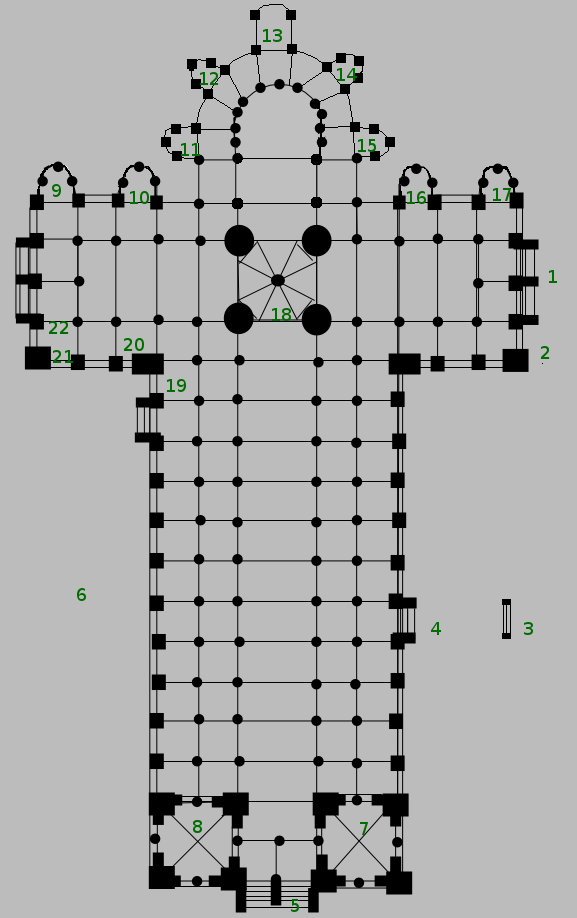 Plano de la basílica